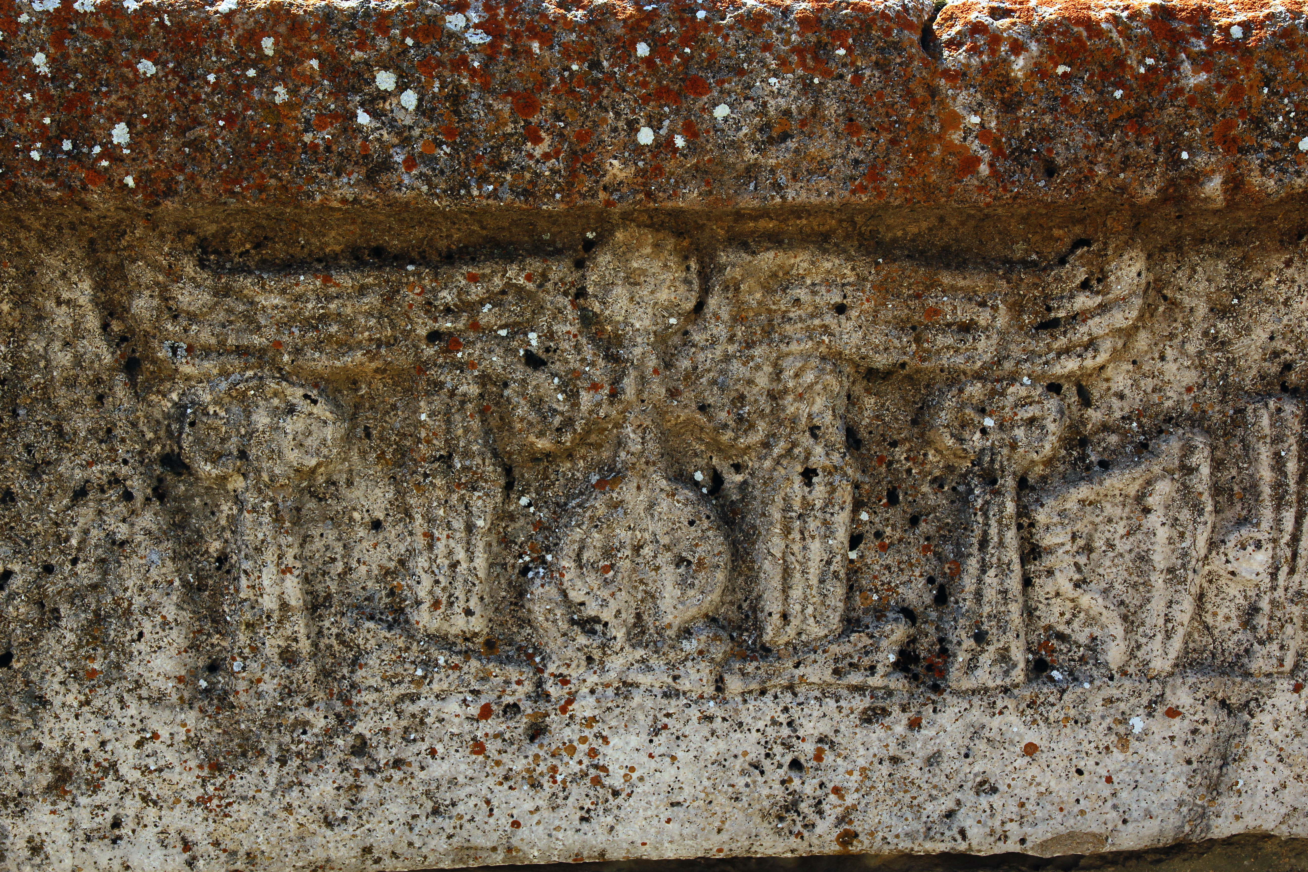 Yalburt, hethitisches Wasserbecken mit einem Feldzugsbericht Tudhalijas IV., nördlich Ilgın in der türkischen Provinz Konya. Südseite Block 1 Kartusche Tudhalijas IV.